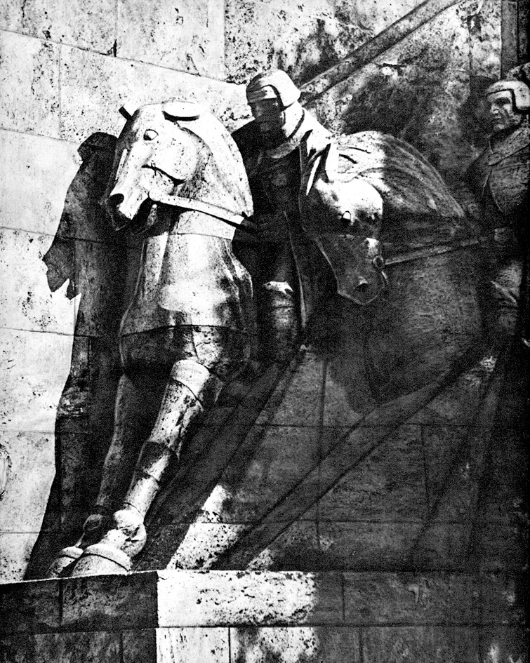 Скульптура мемориального комплекса. Братское кладбище, Рига, Латвия. Скульптор Карл Зале.